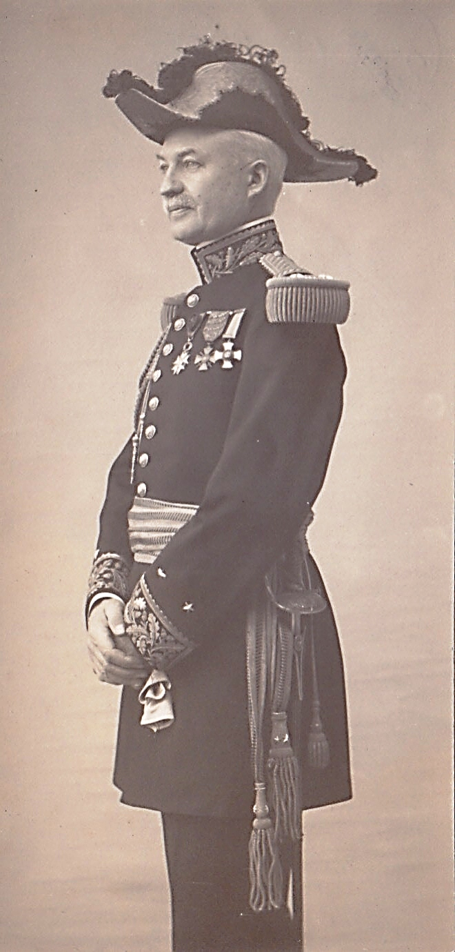 Général de brigade Jean Bouffet (Officier de la Légion d'honneur, Croix de guerre 1939-1945, Ordre du Service distingué (GB))